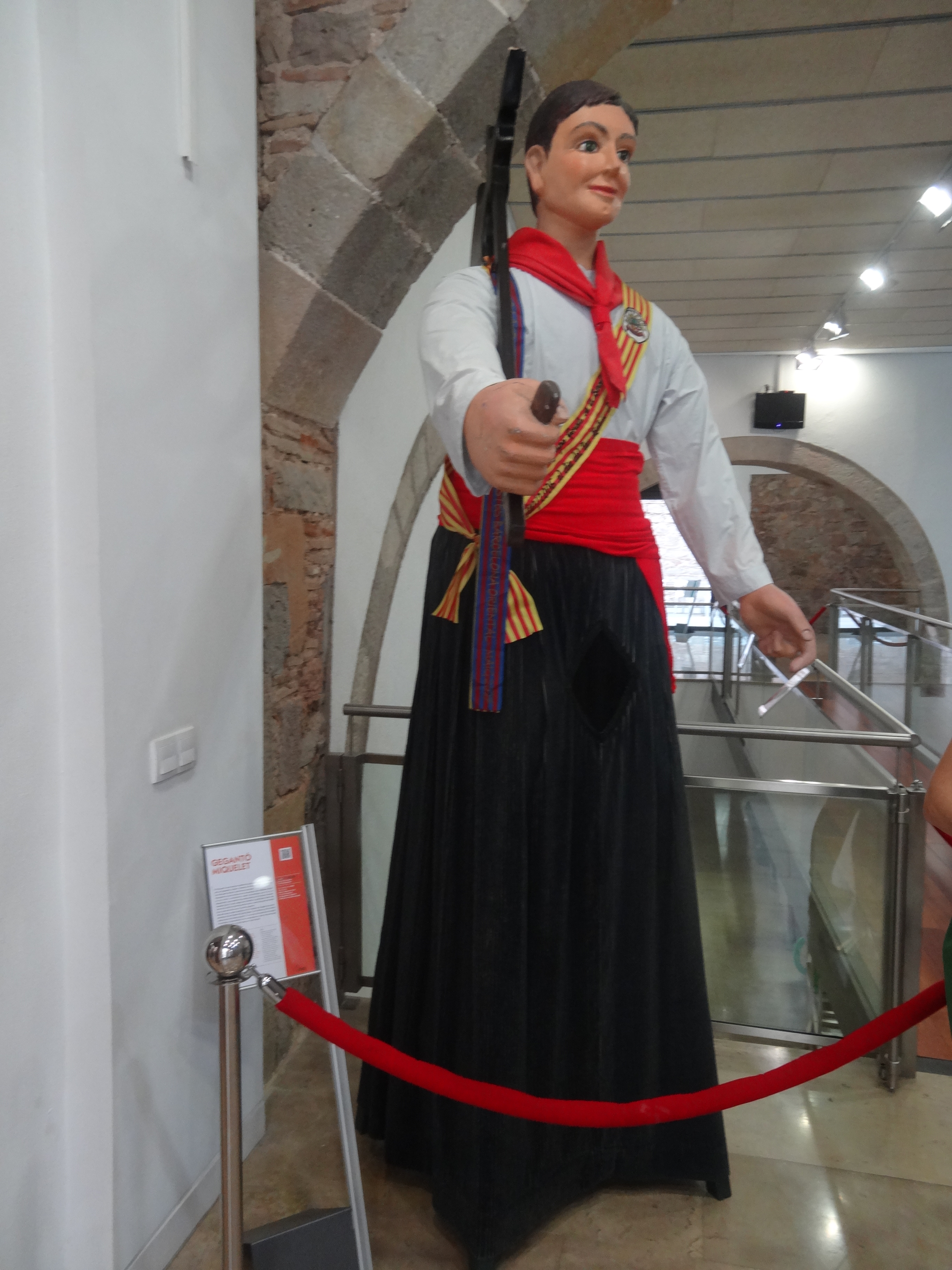 Casa dels Entremesos - Gegantó Miquelet de la Barceloneta